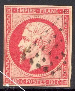 France, stamp Napoleon III Empire (1854)